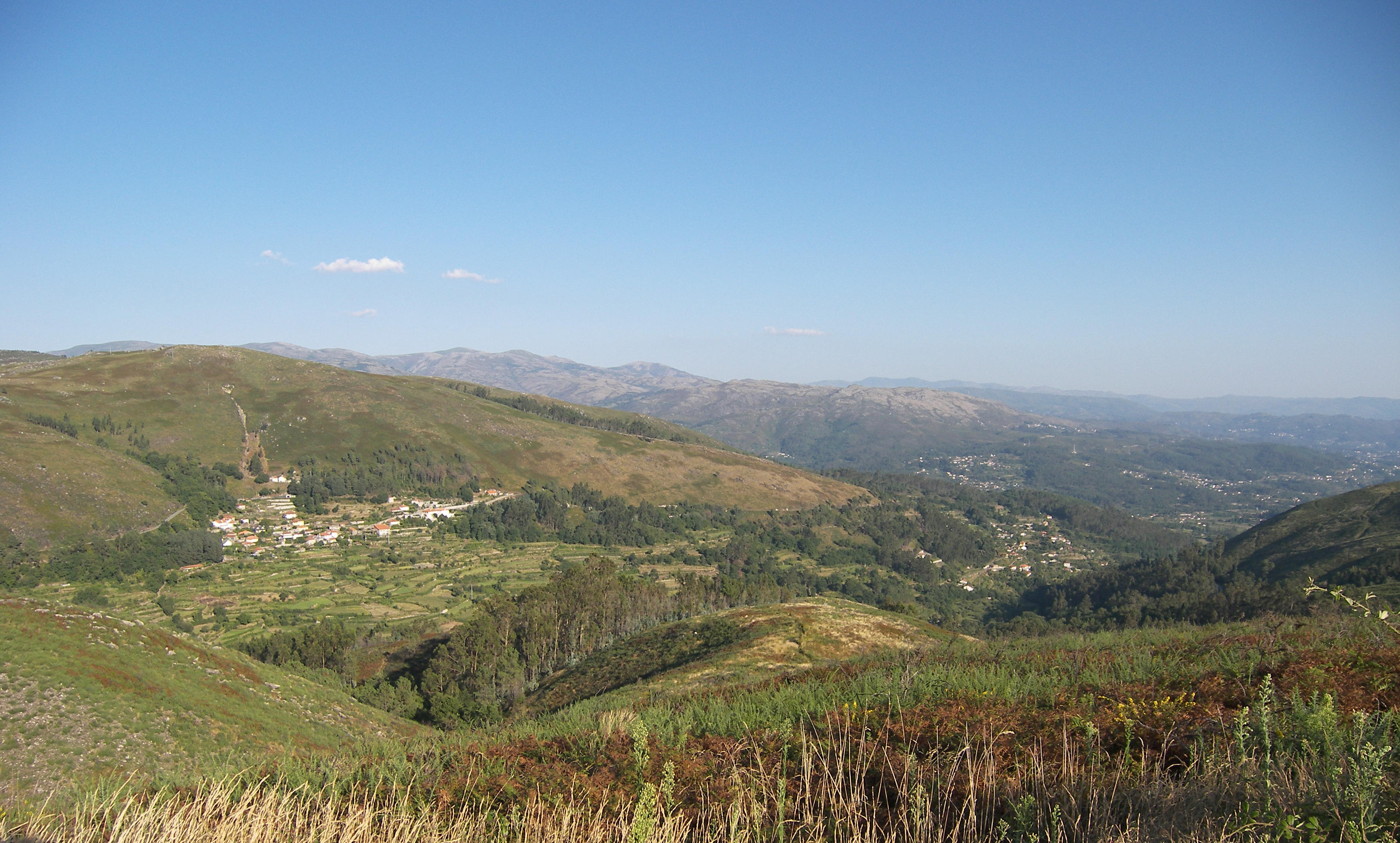 Parque National da Peneda Gerês